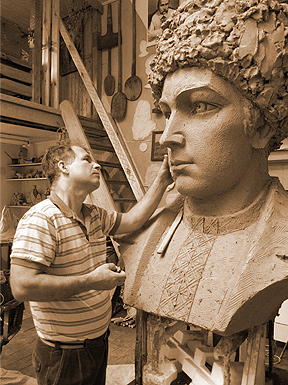 Михайло Горловий